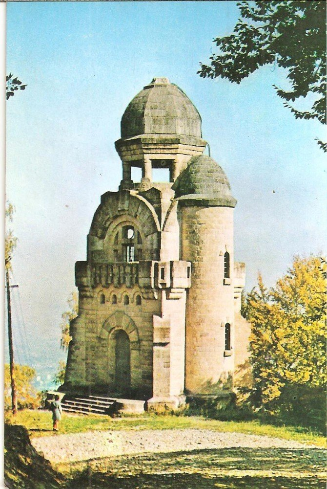 Monumentul Eroilor de la Târgu Ocna în anul 1973, înainte de renovare.